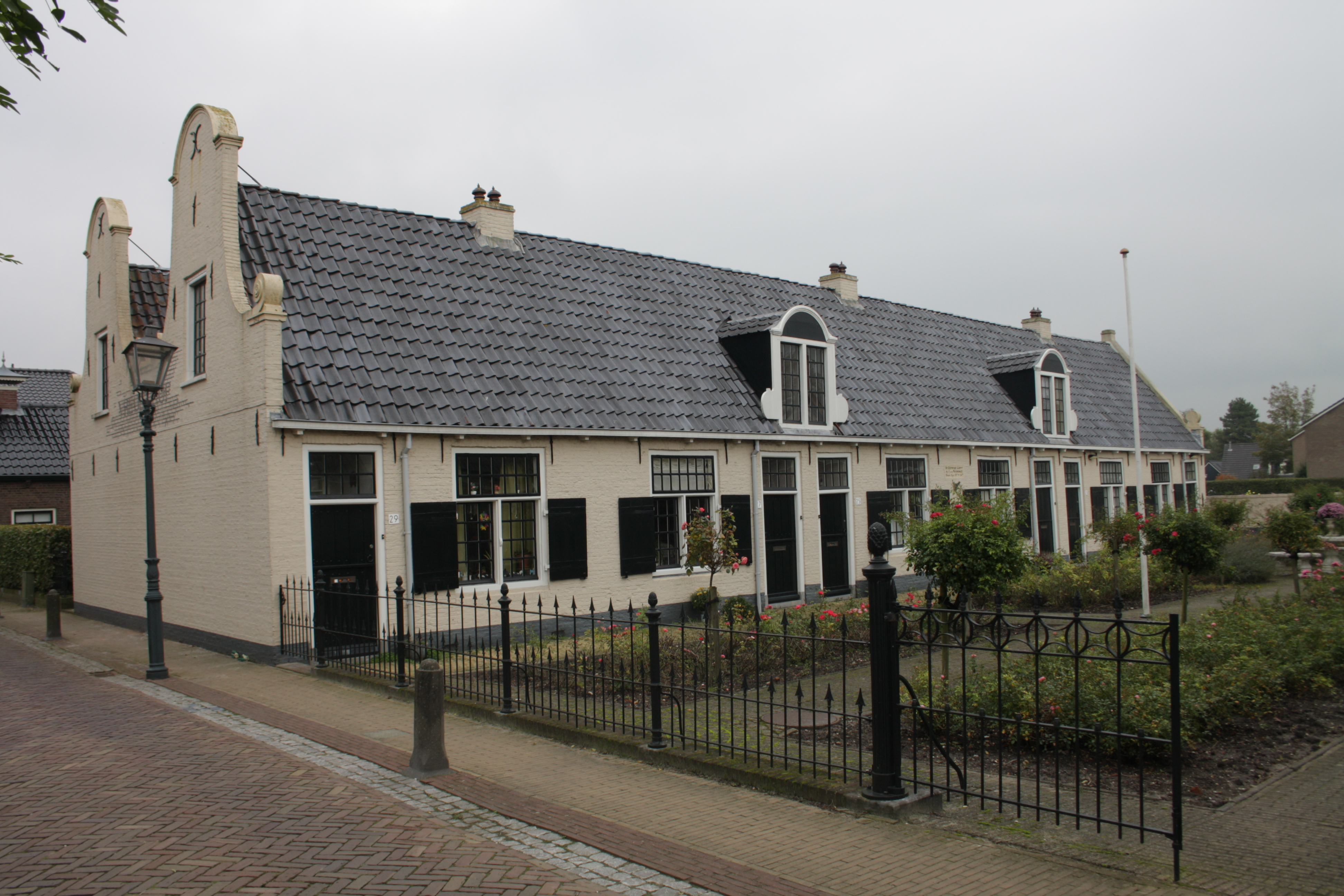 Dronrijp, Dûbelestreek 19-29, Gasthuis Vredenhof